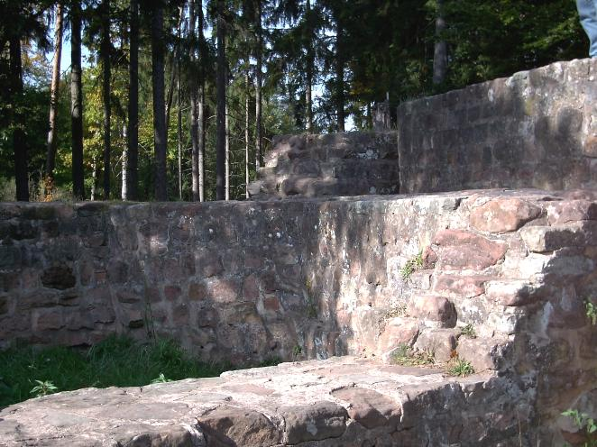 Foto von der Ruine der Merburg